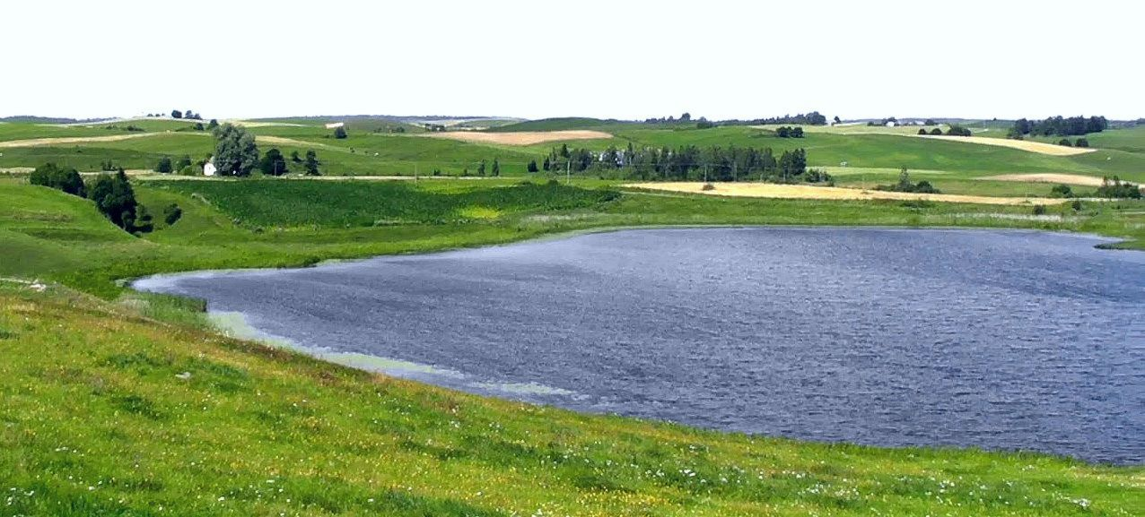 Wiżajny, Jezioro Ślepak